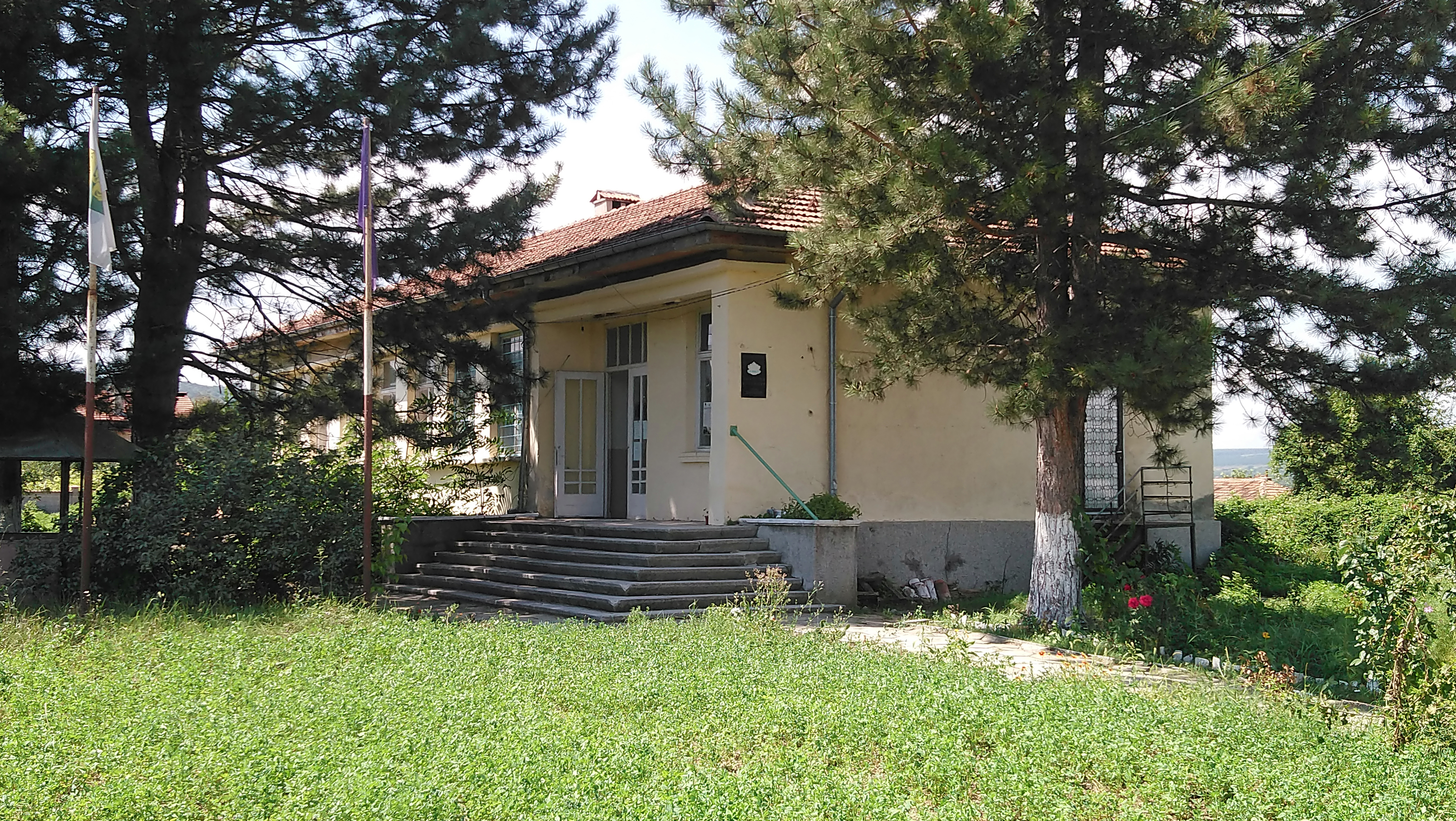 Село Красимир - община Дългопол - кметството